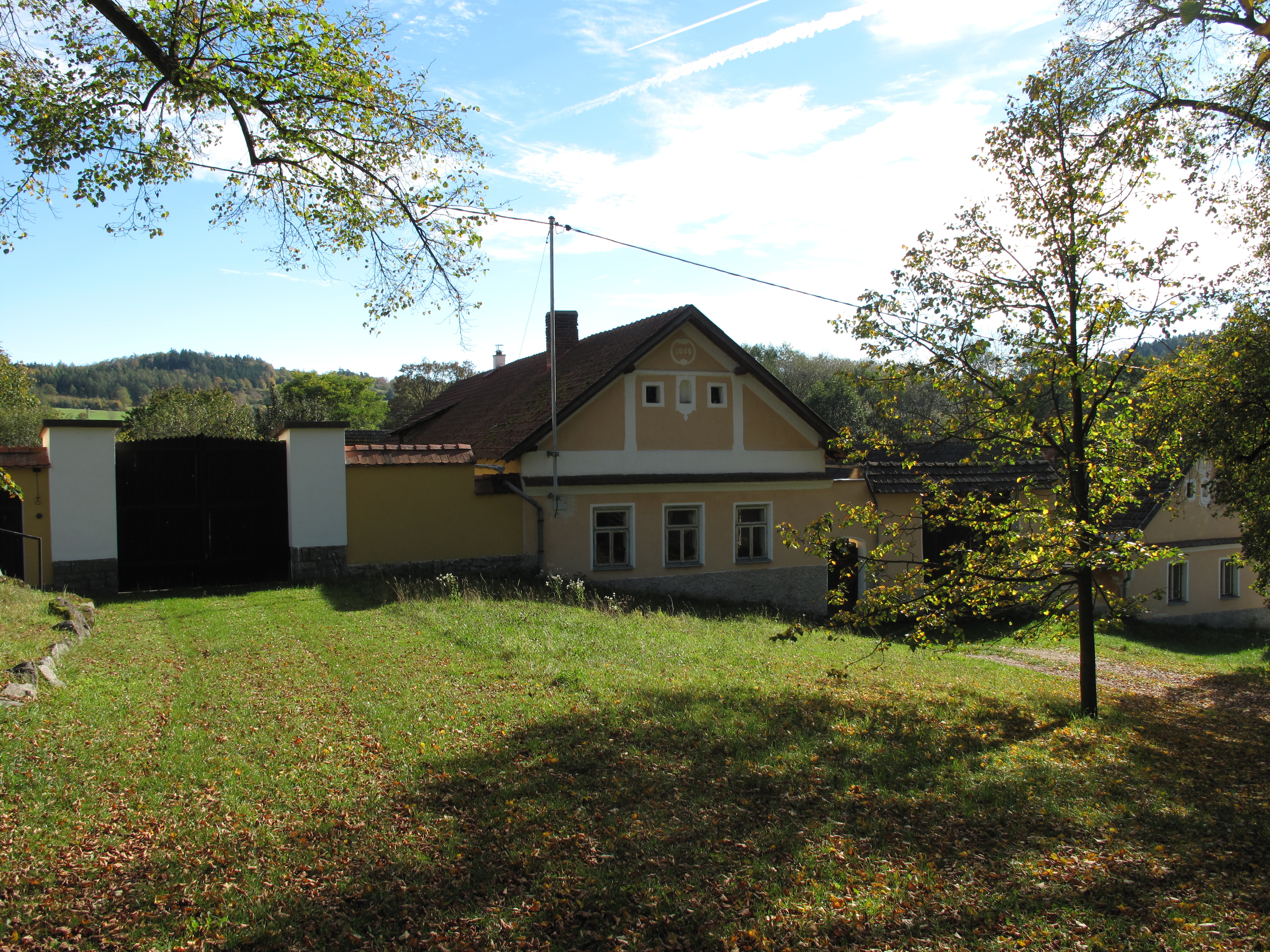 Žlutý dům v Libčicích. Okres Příbram, Česká republika.